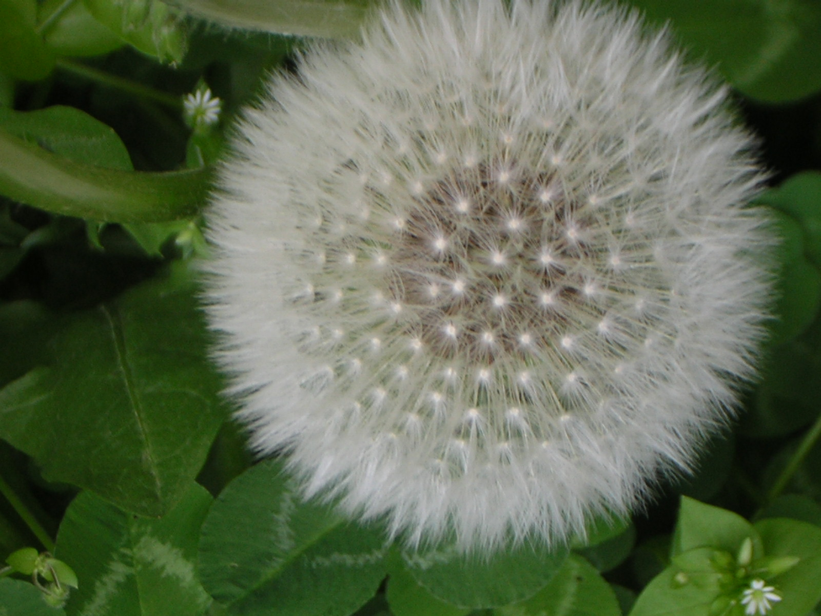 garden flower